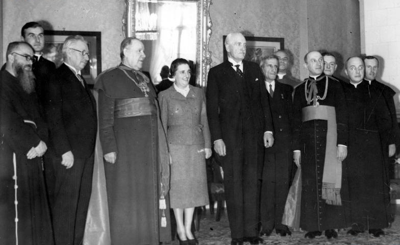 Delegacja chłopów z Inowłodzia u prezydenta RP Ignacego Mościckiego. Widoczni m.in. Maria Mościcka, arcybiskup Stanisław Gall (4. z lewej), minister wyznań religijnych i oświecenia publicznego Wojciech Świętosławski (3. z lewej), minister rolnictwa i reform rolnych Juliusz Poniatowski (stoi obok prezydenta), ks. prałat Zygmunt Kaczyński (4. z prawej), kapelan prezydenta RP Ignacego Mościckiego ks. Jan Humpola (5. z prawej), ojciec Maksymilian Kolbe (1. z lewej).